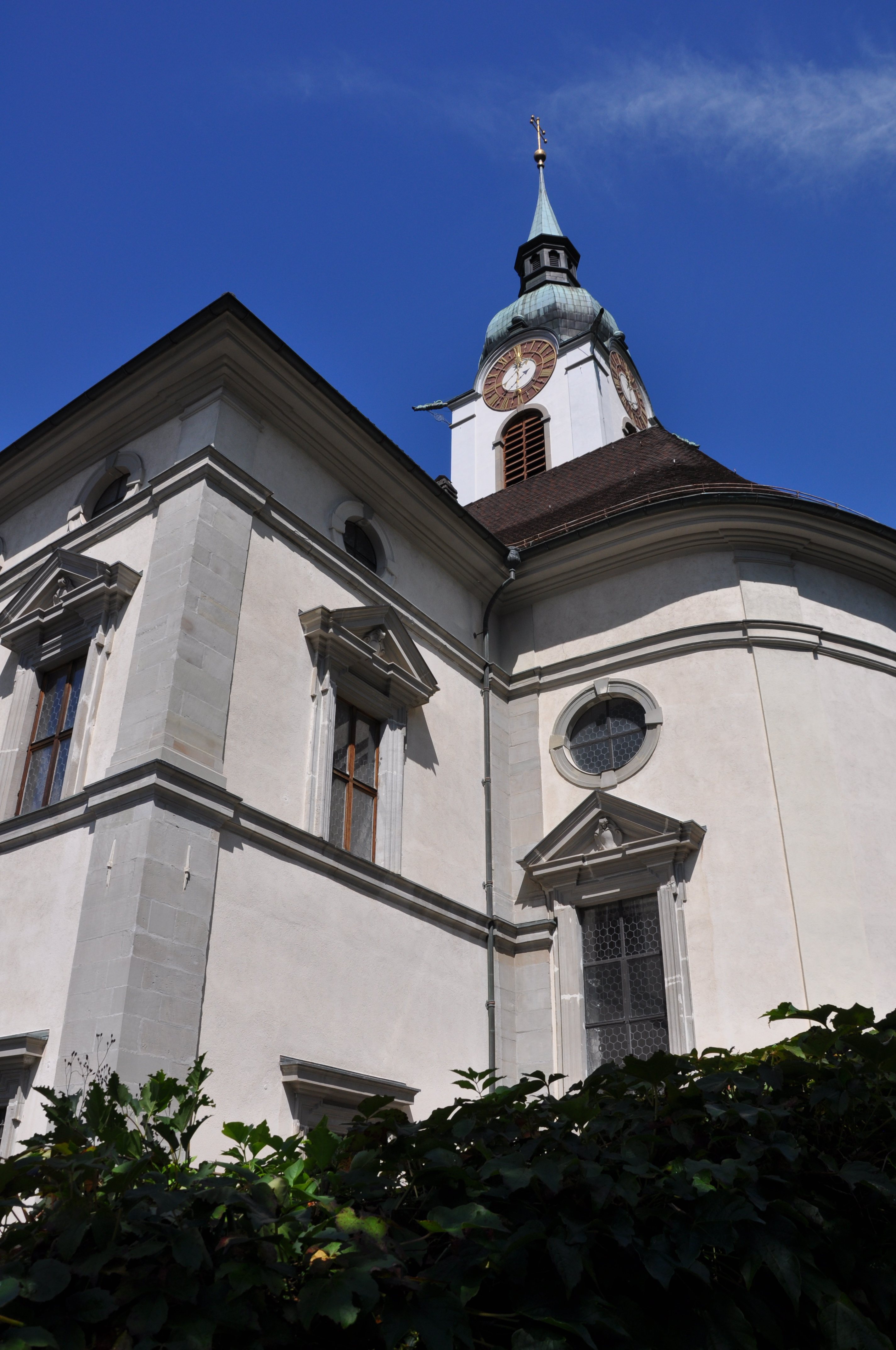 Eglise vue extérieure